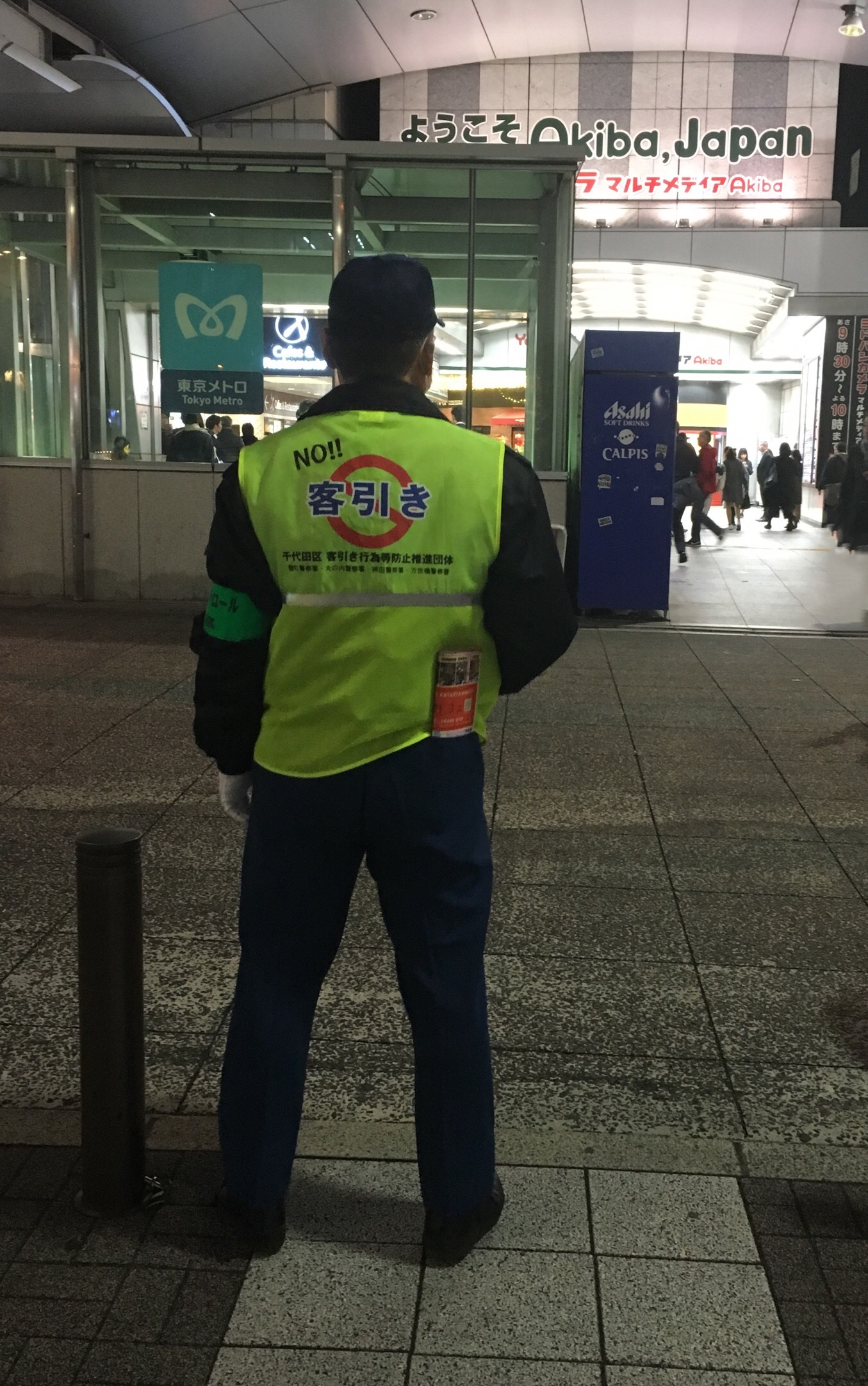 客引き反対警備員、秋葉原にて (Anti touting guard, near Akihabara)